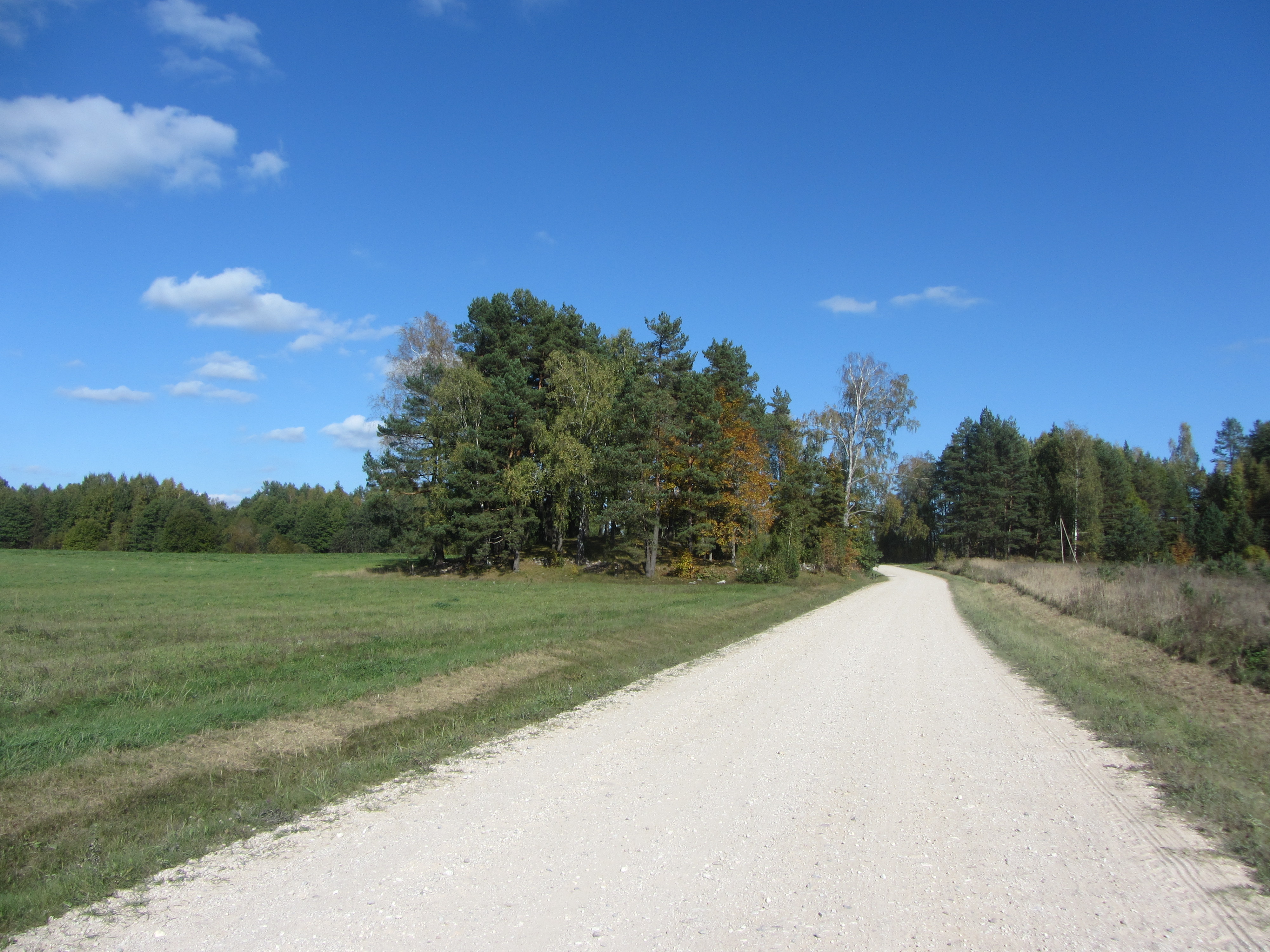 Ceikinių sen., Lithuania